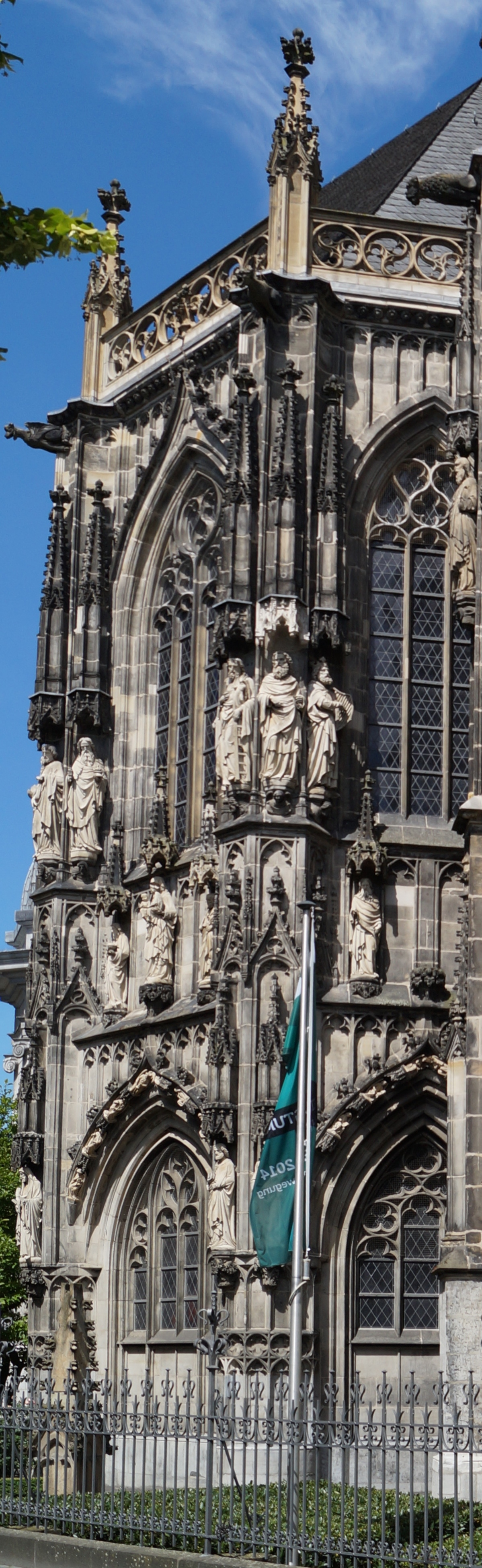 Aachener Dom Annakapelle